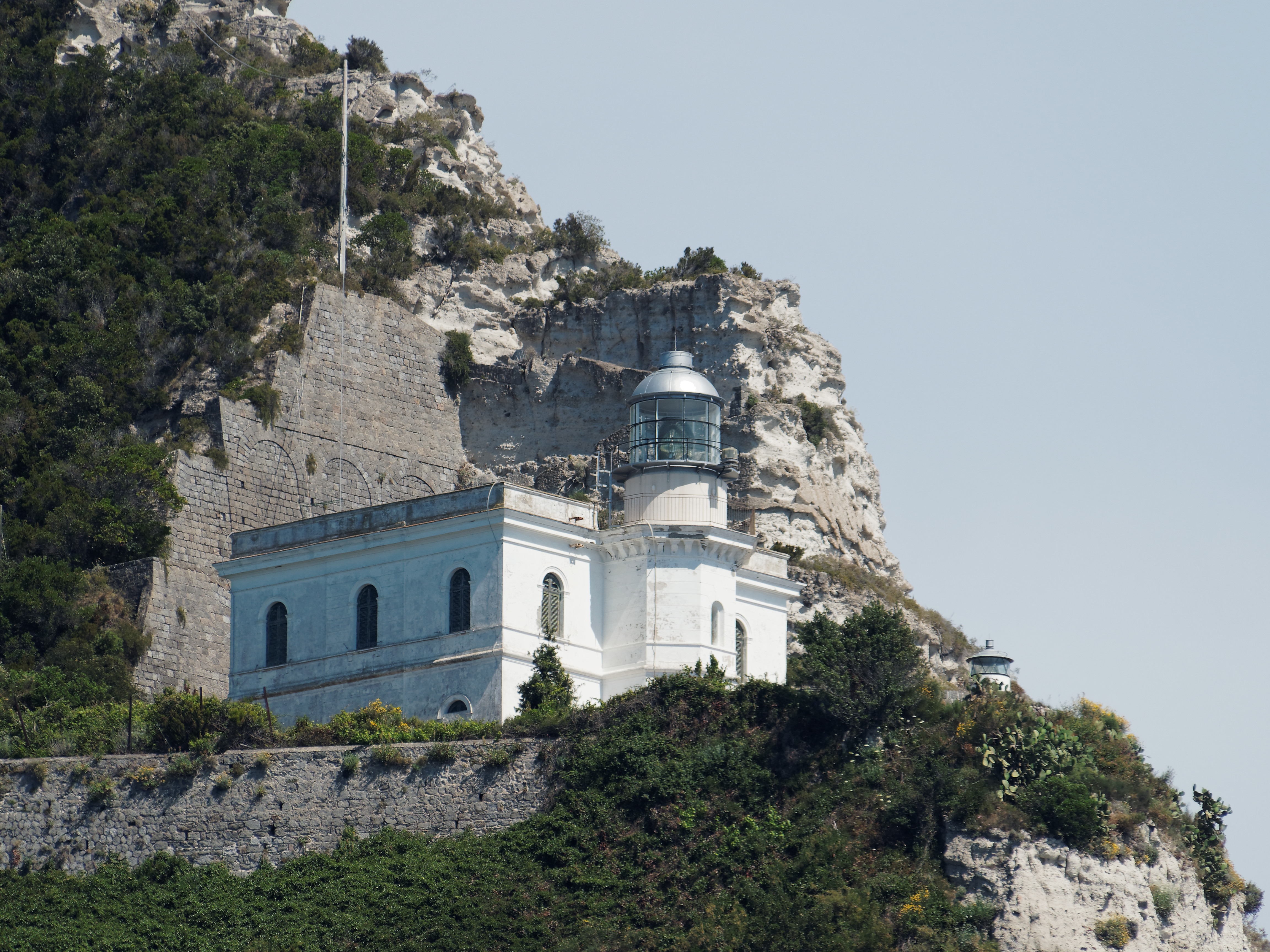 Das Leuchtfeuer Faro Punta Imperatore auf der Westseite der Insel Ischia, aus nördlicher Richtung, Kampanien, Italien.